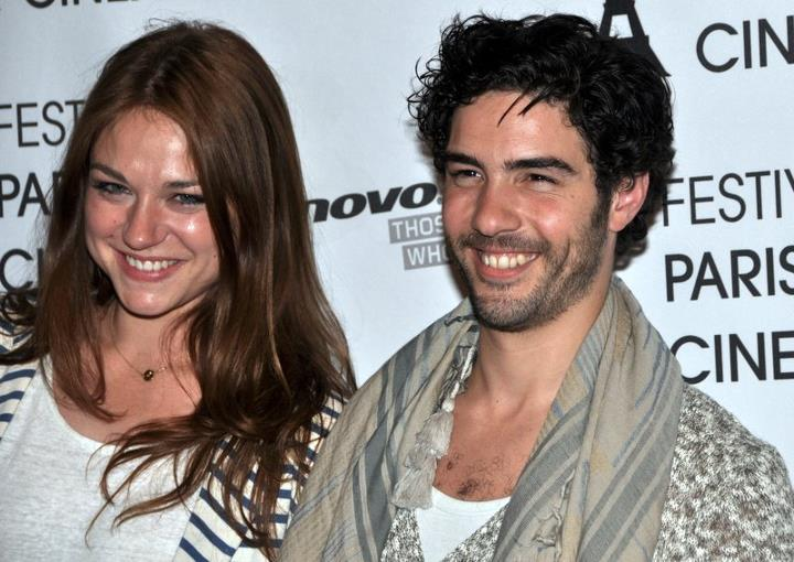 Emilie Dequenne et Tahar Rahim à une avant-première de À perdre la raison.